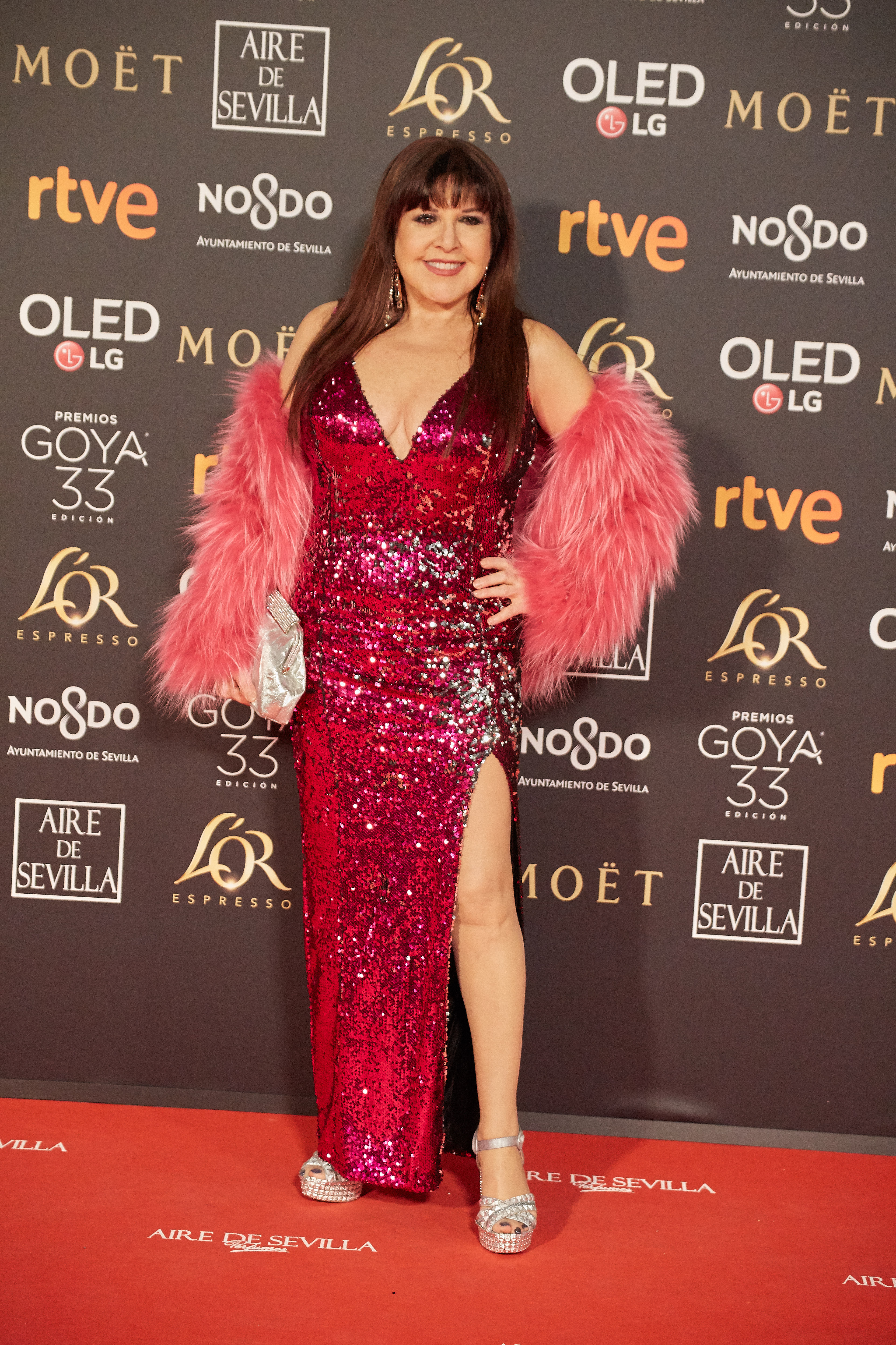 Loles León en la alfombra roja de los Premios Goya celebrados en Sevilla en Febrero 2019